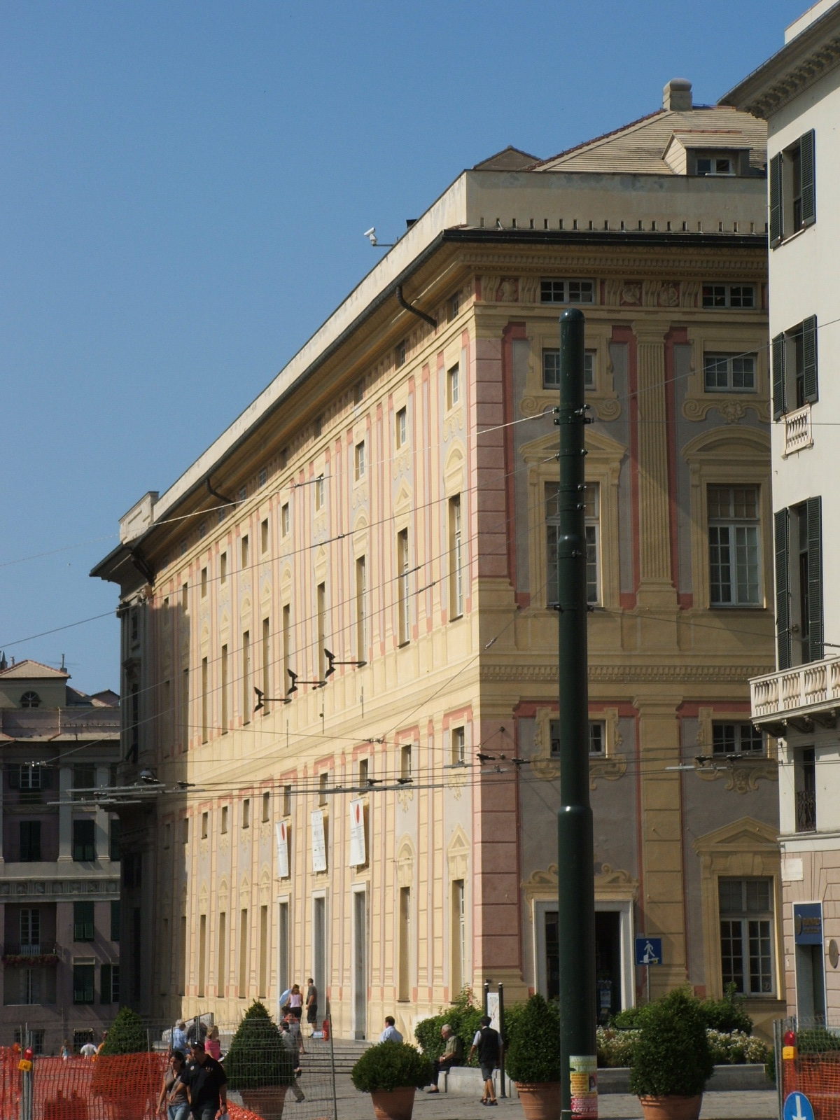 Immagine dalla città di Genova Palazzo Ducale